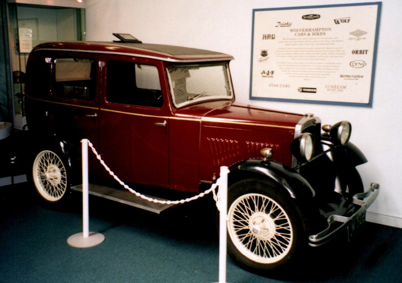 A.J.S. 1931